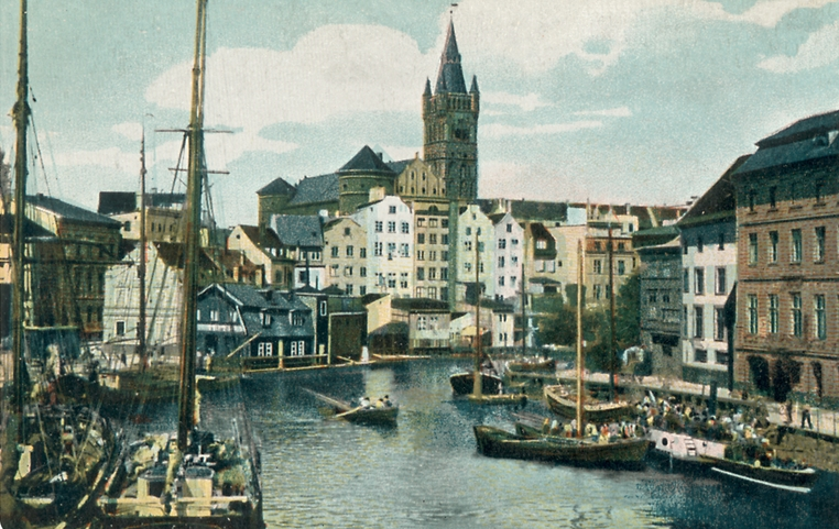 Königsberg